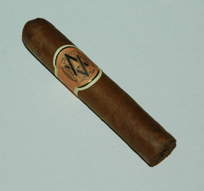 AVO Zigarre, Classic No. 9